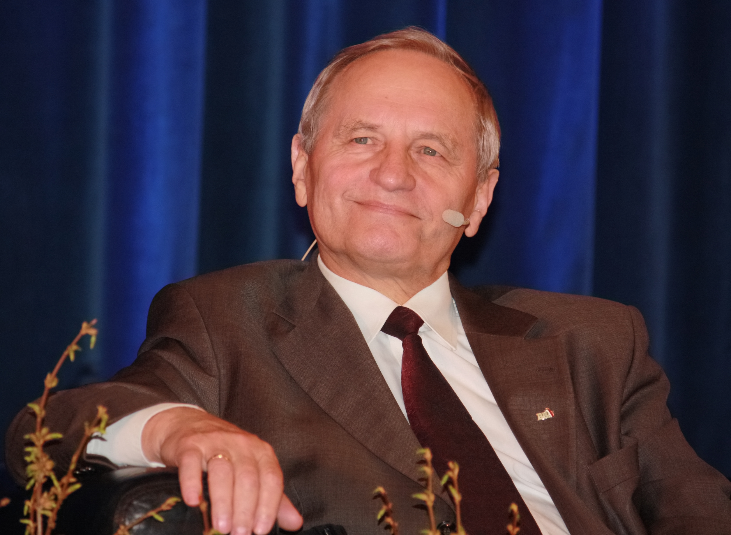 Gen. Stanisław Koziej na debacie pt. Za mundurem panny sznurem... zorganizowanej przez Uniwersytet Otwarty Uniwersytetu Warszawskiego